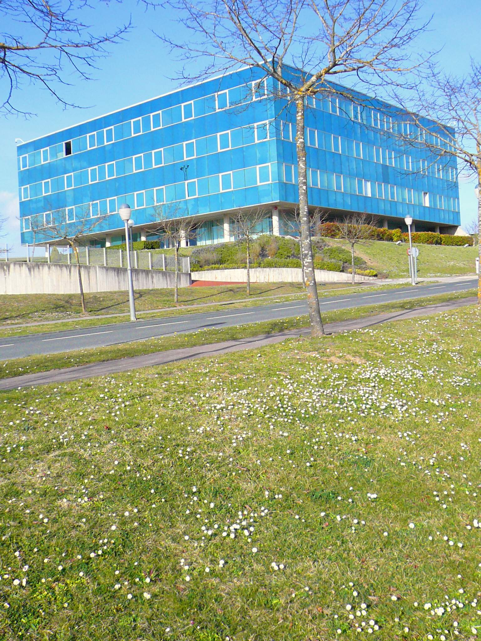 Parque Tecnológico de Álava - Edificio E6 (Altran-Vitoria)